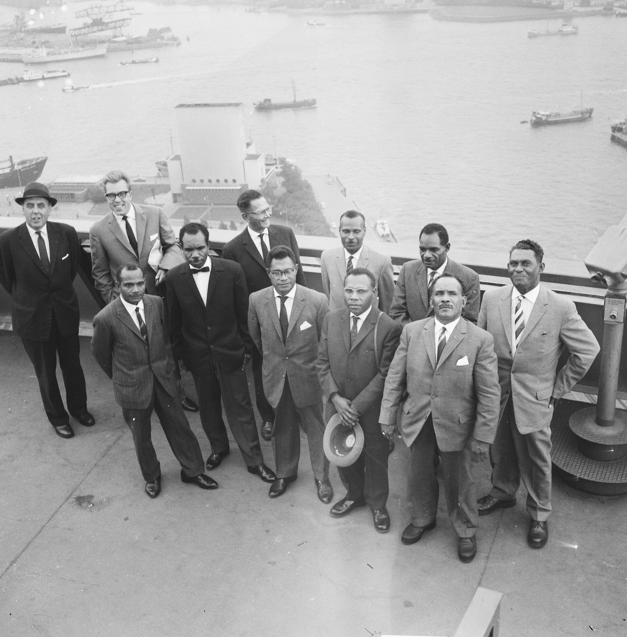 Collectie / Archief : Fotocollectie Anefo Reportage / Serie : [ onbekend ] Beschrijving : Nieuw-Guinea Raad op Euromast Datum : 11 september 1961 Locatie : Rotterdam, Zuid-Holland Trefwoorden : raden Instellingsnaam : Euromast Fotograaf : Lindeboom, Henk / Anefo Auteursrechthebbende : Nationaal Archief Materiaalsoort : Negatief (zwart/wit) Nummer archiefinventaris : bekijk toegang 2.24.01.03 Bestanddeelnummer : 912-9197